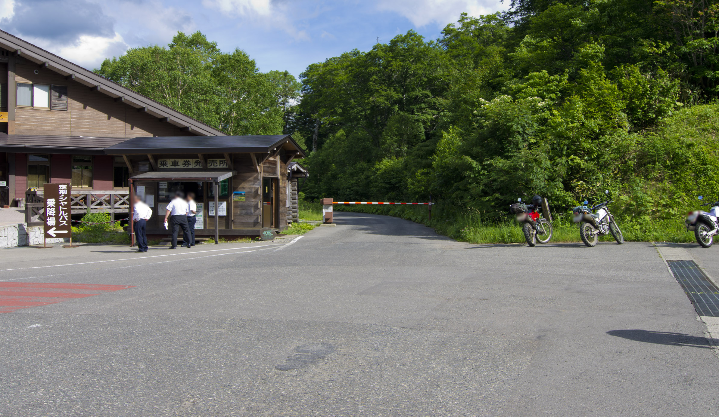 群馬・福島県道1号 沼田檜枝岐 御池入口 （福島県公安委員会により許可車以外は年間を通じて進入禁止とされている）